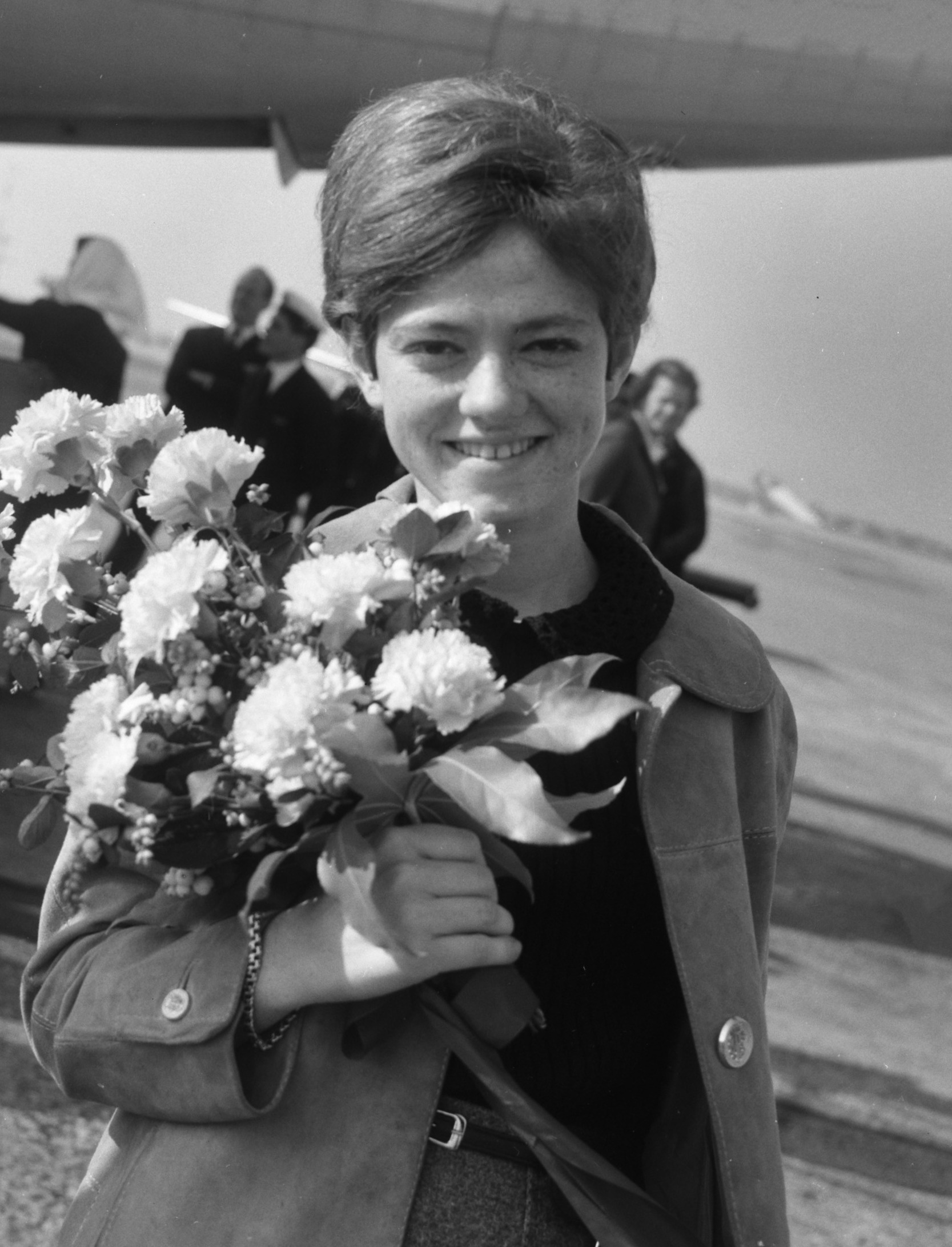 Aankomst Rita Pavone (zangeres), Grand Gala du Disque